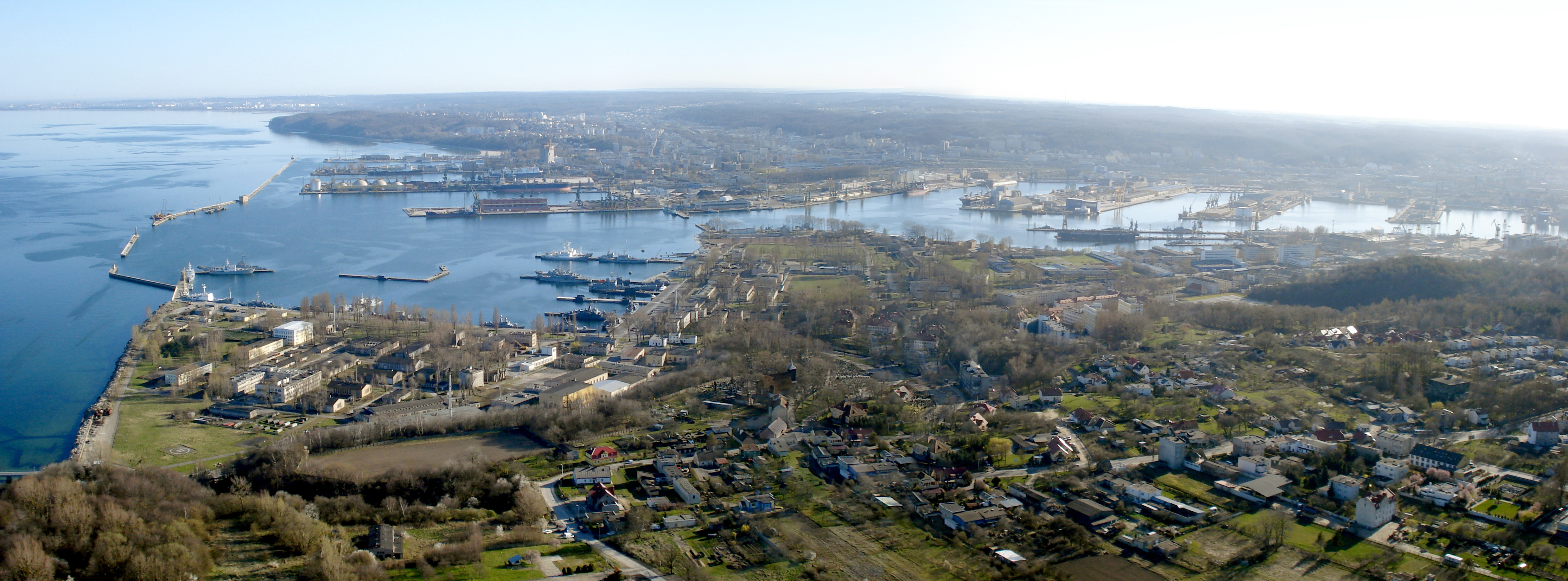 Gdynia z "lotu ptaka"